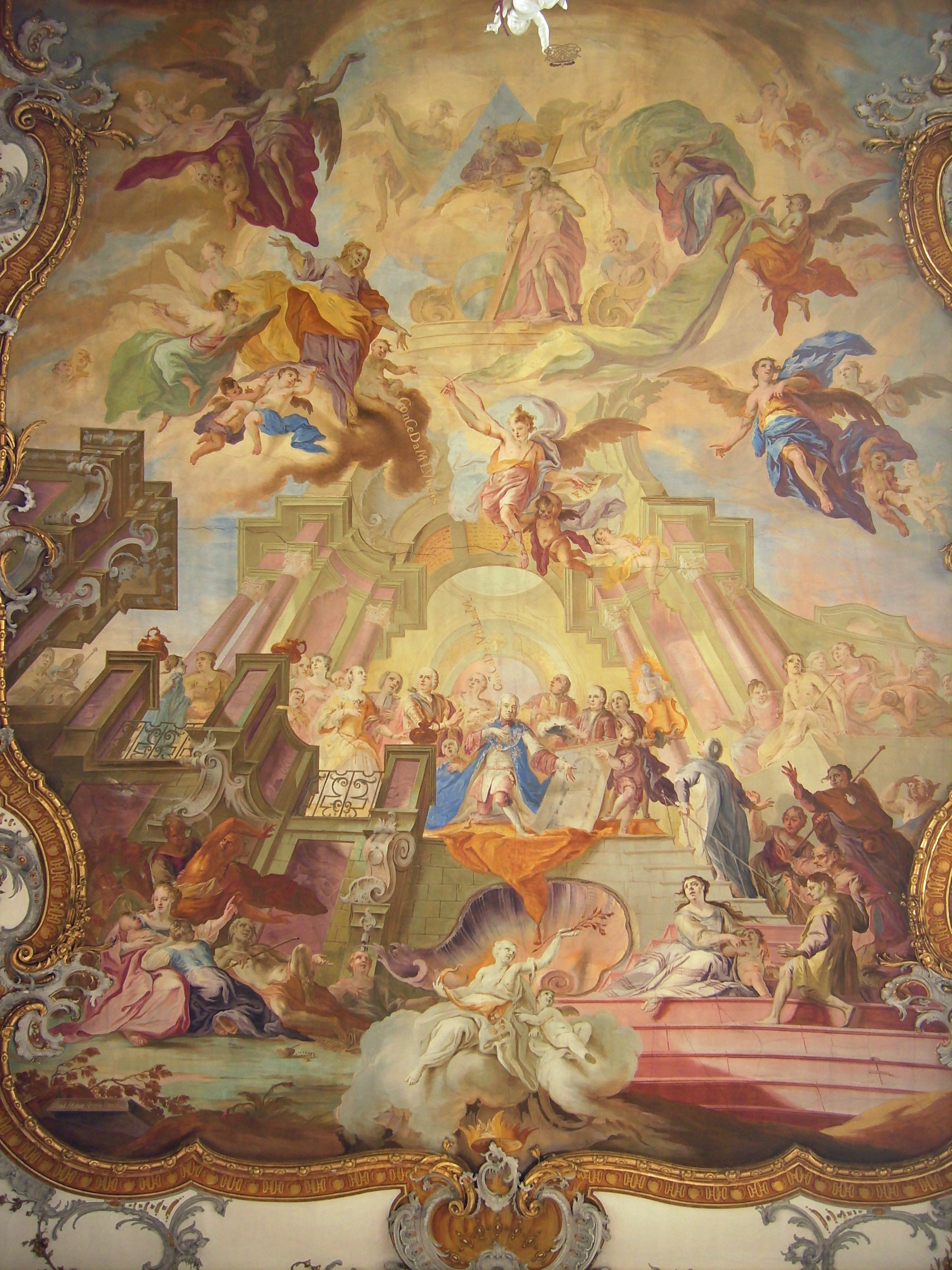 Haigerloch Wallfahrtskirche Sankt Anna